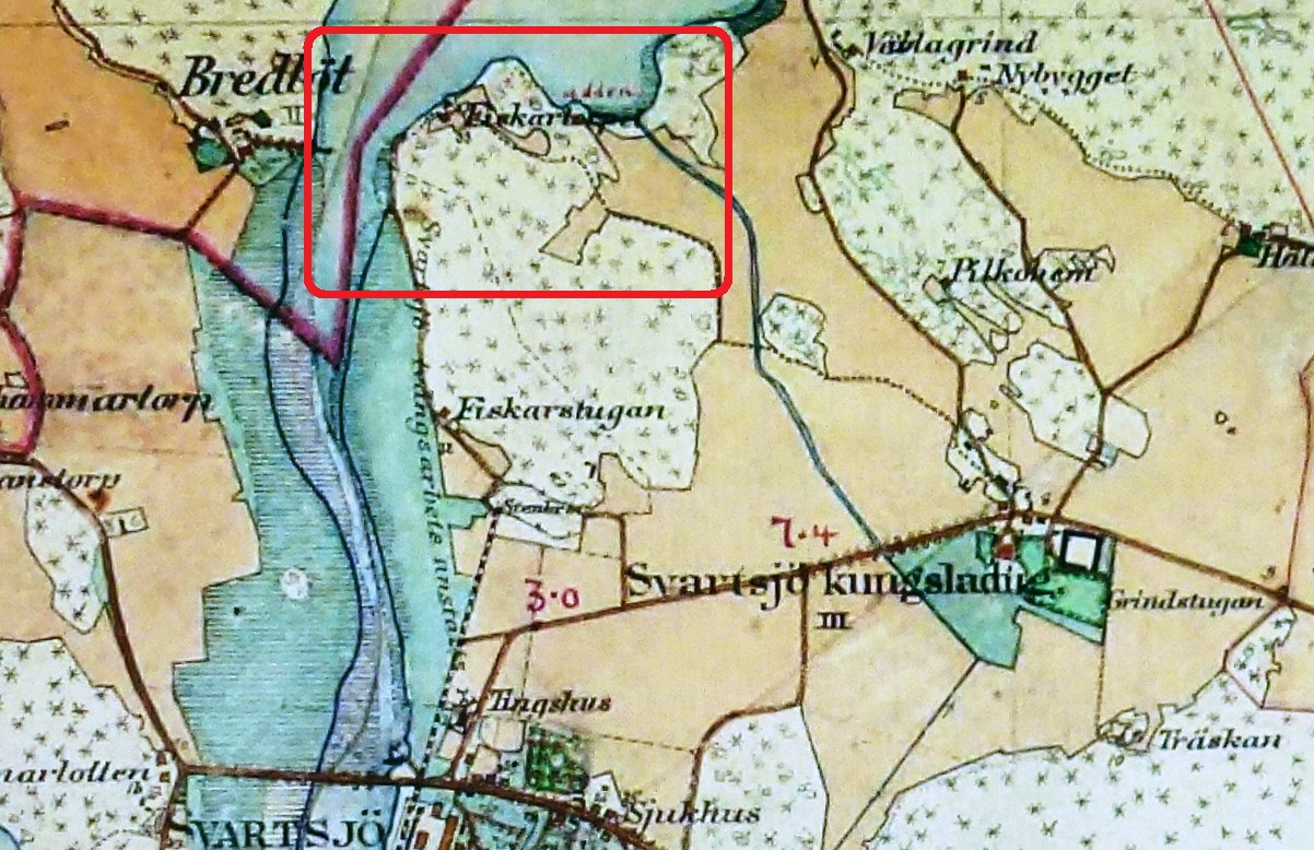 Läget för Fiskartorpet, Svartsjö på häradskartan